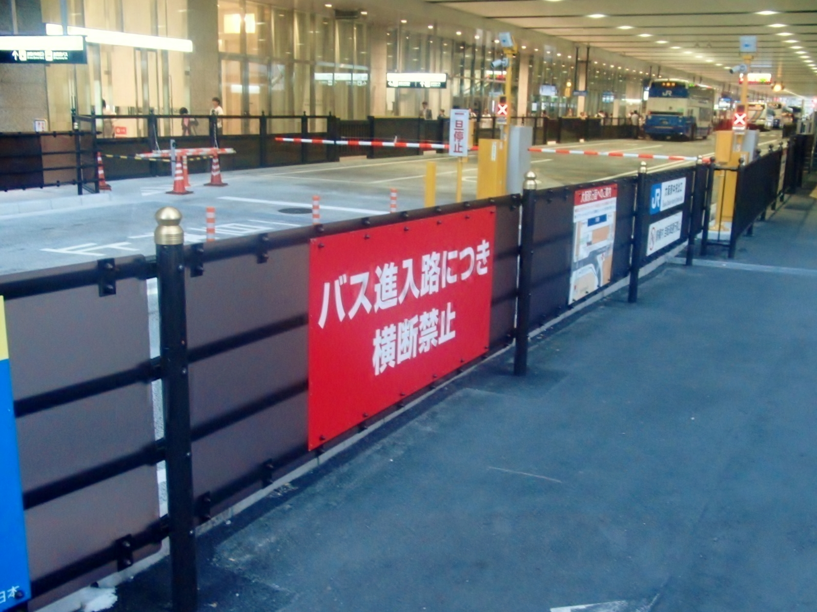 ヨドバシ梅田前の様子